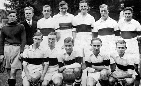 L'équipe de l'Olympique lillois vainqueur du championnat de France 1932/1933. En haut et de gauche à droite : Défossé, Hochart (dirigeant), Meuris, Vandooren, Beaucourt (capitaine), Mac Gowan, Théry. En bas et de gauche à droite : Decottignies, Lutterlock, Barrett, Varga, Winckelmans.